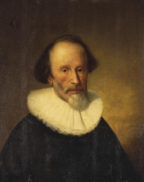 Ritratto di un uomo barbuto in busto Flinck 1638, Henri and Albert Hehct collection